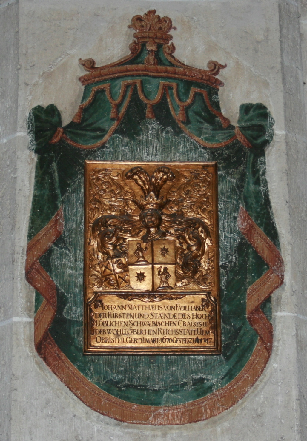 Totenschild für Johann Matthäus von Faulhaber (1670-1742) an einem Pfeiler im nördlichen Seitenschiff des Ulmer Münsters. Faulhaber-Wappen mit kleinerem Beiwappen der Familie Ehinger (Familie seiner Ehefrau). Die Inschrift lautet: "JOHANN MATTHÆUS VON FAULHABER DER FÜRSTEN UND STÆNDE DES HOCHLÖBLICHEN SCHWÄBISCHEN CRAISES U. DER WOHLLÖBLICHEN REICHSSTATT ULM OBRISTER GEB. D. 1. MART. 1670: GEST. D. 21 AP. 1742"